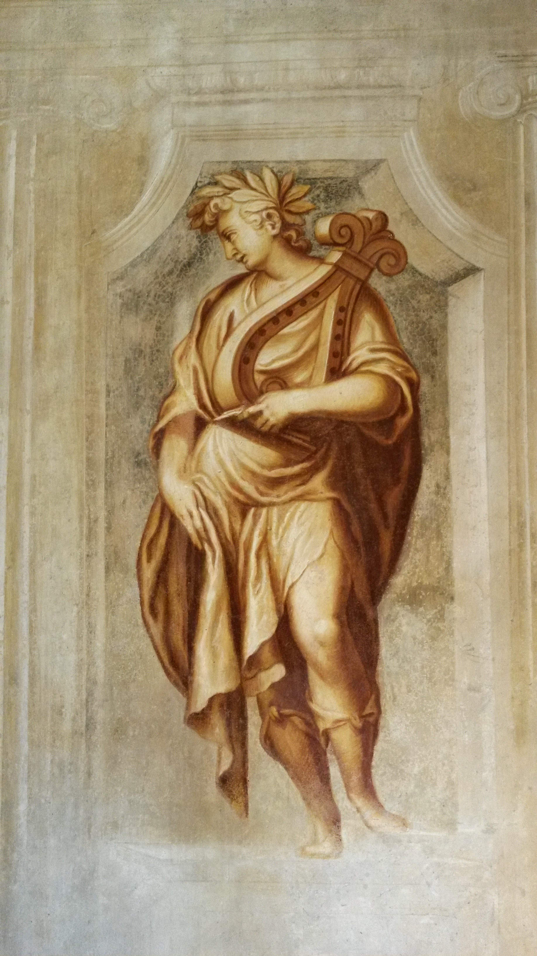 Paolo Farinati, "Apollo con la lira", 1590 circa, affresco (restaurato nel 2016). Apollo è il dio della musica colta; sulla parete opposta è dipinto Bacco, il dio della musica primitiva.